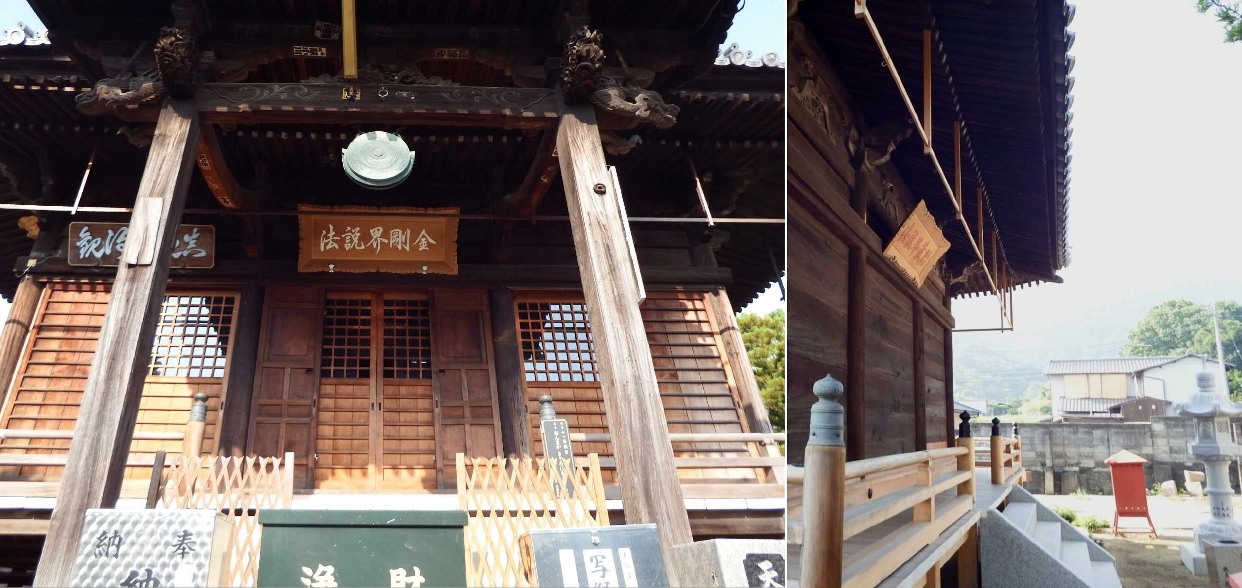 天皇寺の本堂の裏表